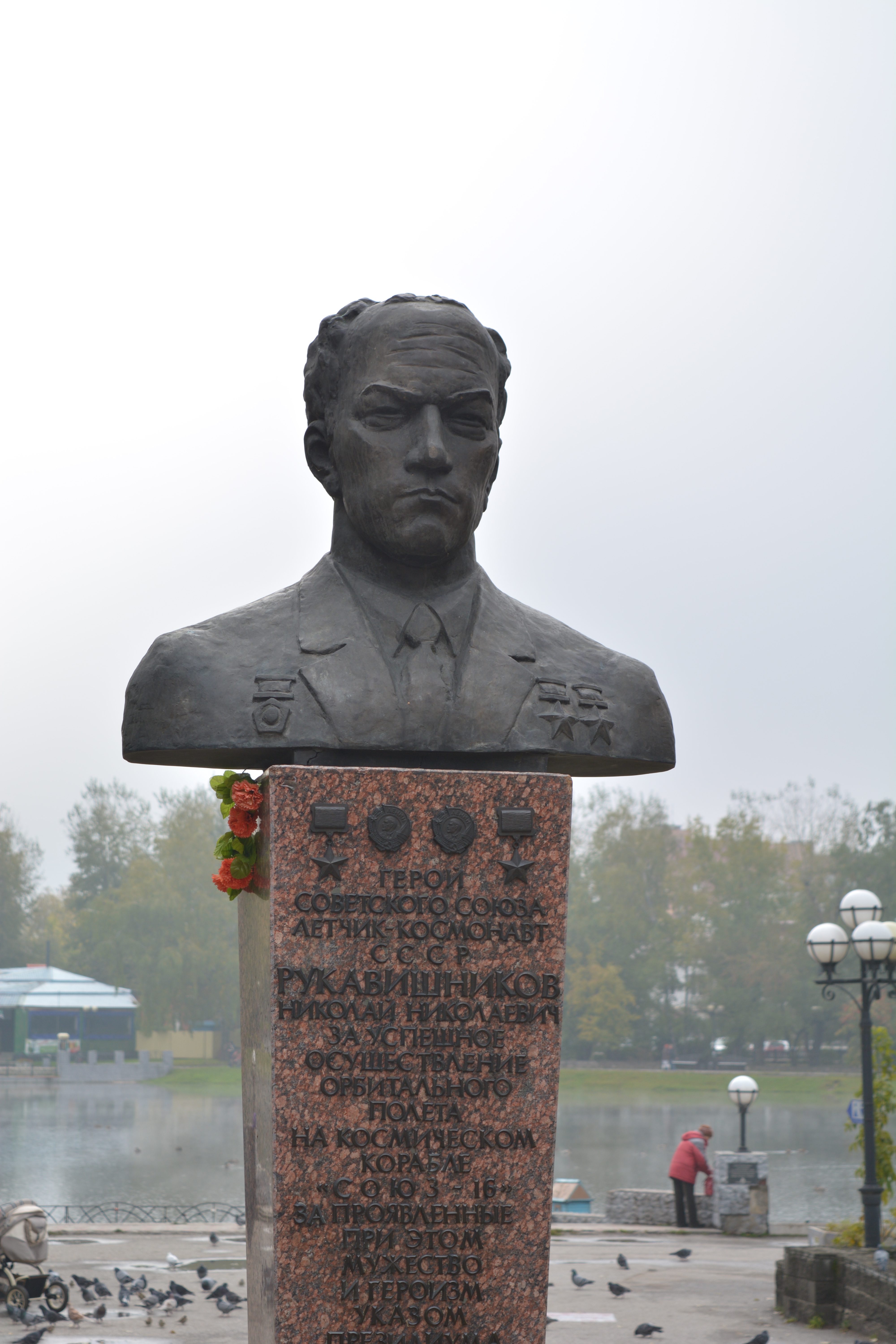 Бюст дважды Героя Советского Союза лётчика-космонавта Н. Н. Рукавишникова: Белое озеро, Томск, Томская область